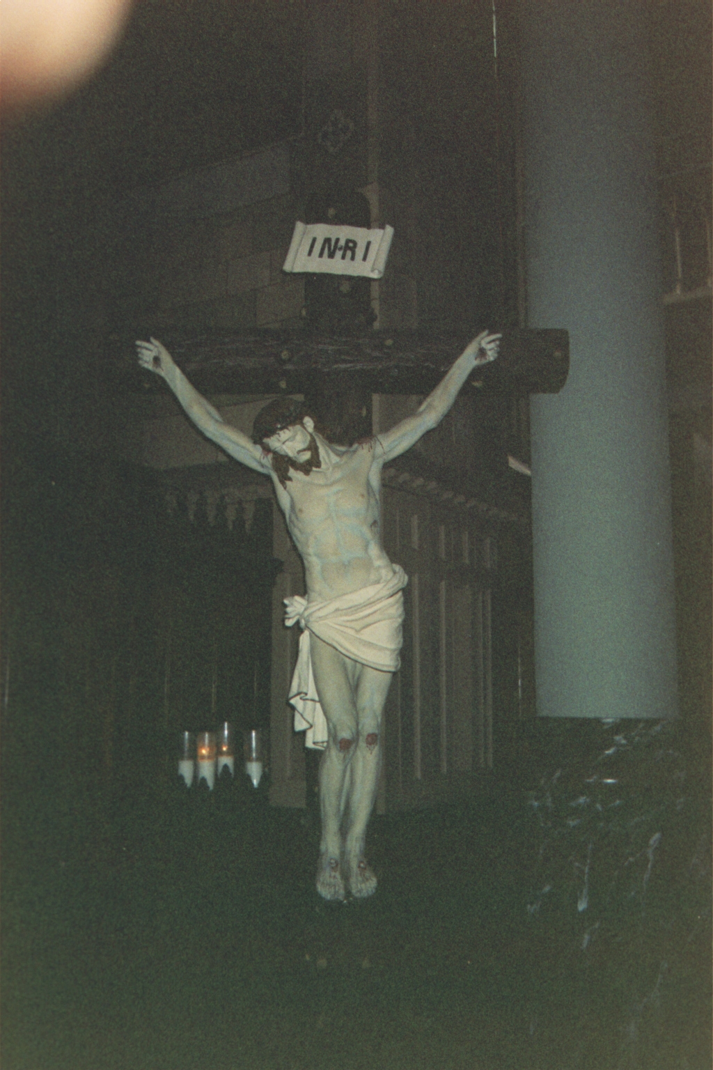 Jésus crucifié, cocathédrale Saint-Antoine-de-Padoue, à Longueuil (Québec). Photo prise par Utilisateur:ADM le 24 juillet 2005